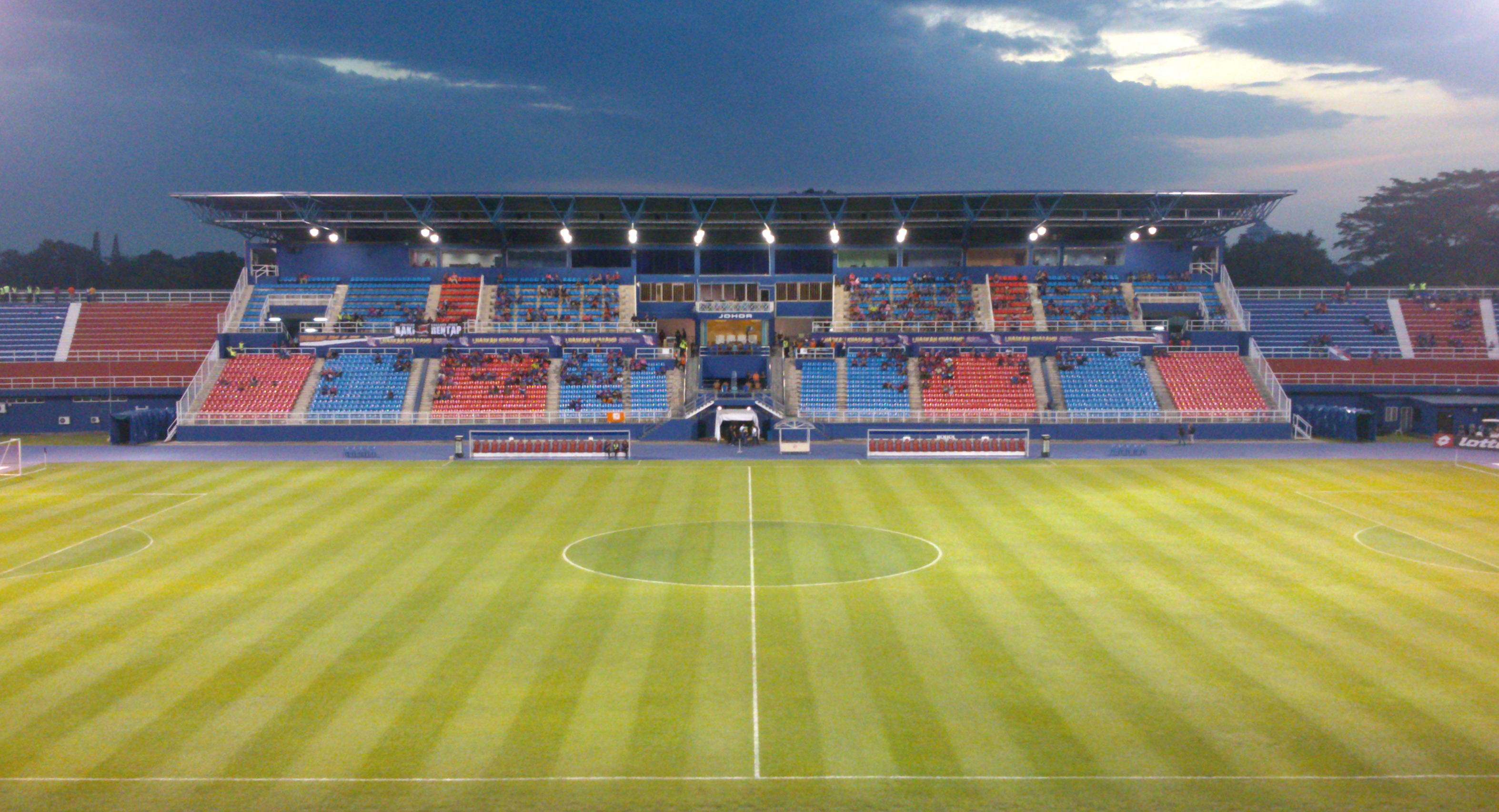 Pemandangan ke arah grandstand Stadium Larkin pada 27 Februari 2013